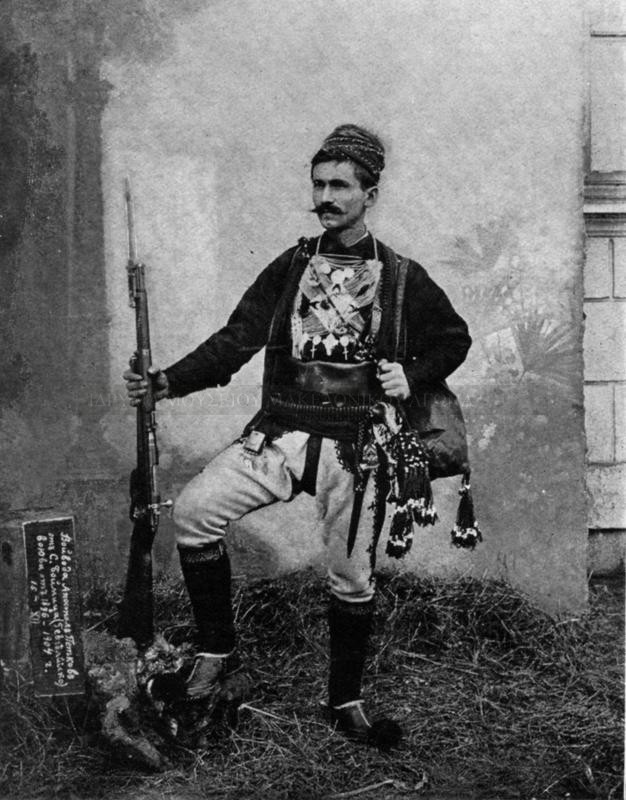 Войводата Апостол Петков Терзиев Ениджевардарското слънце. Автор: Алберт Сониксен (1878-1931)